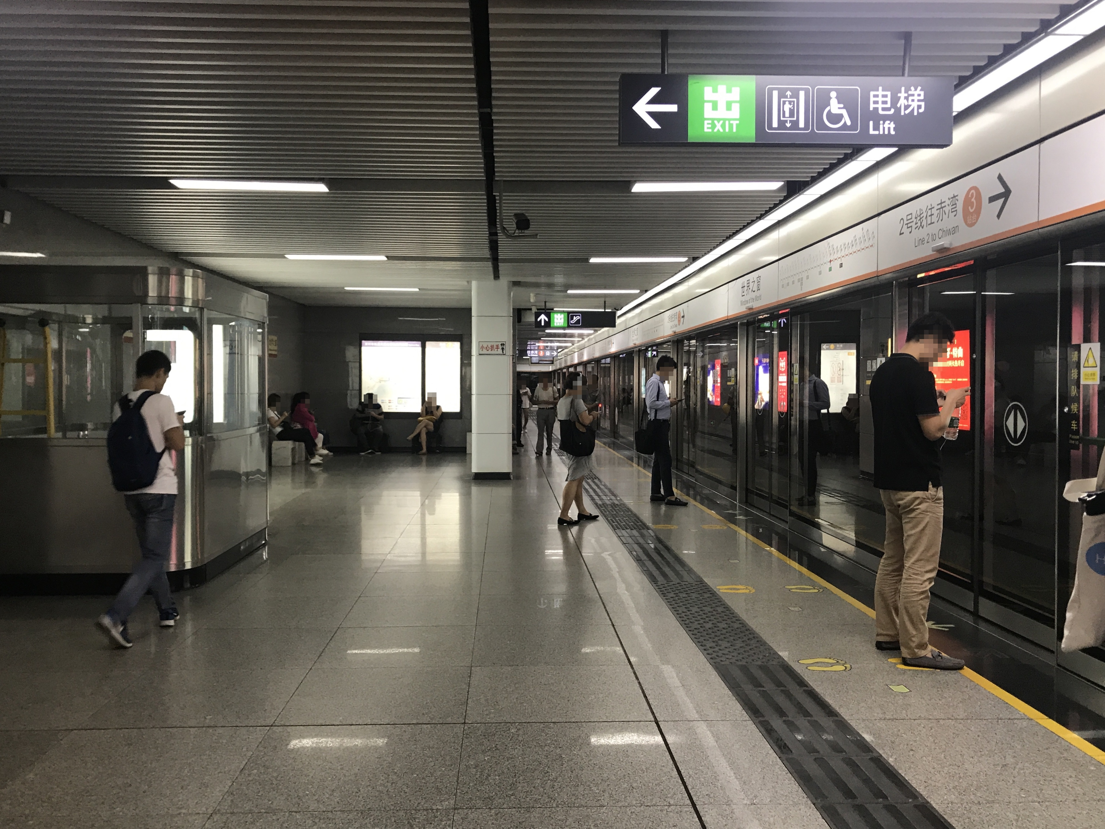 世界の窓駅(蛇口線・赤湾方面)のホーム